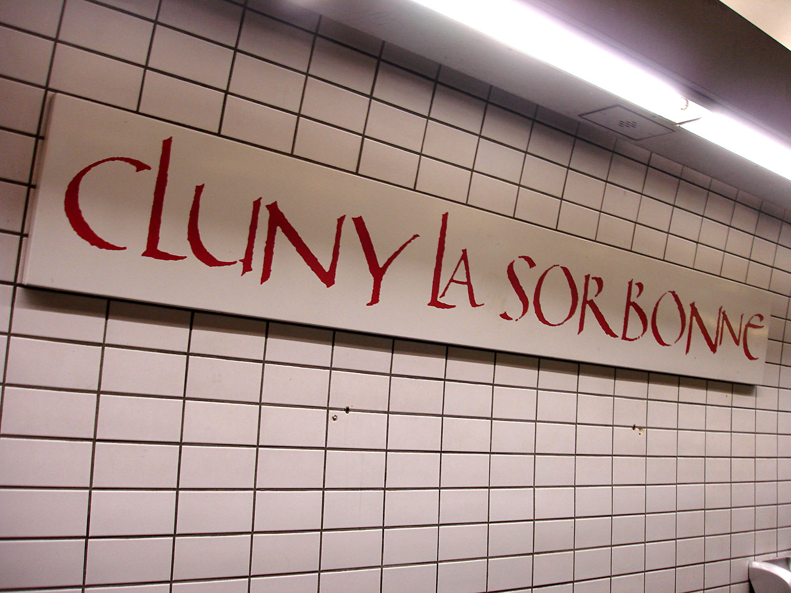 Panneau de la station Cluny - La Sorbonne de la ligne 10 du métro de Paris, France